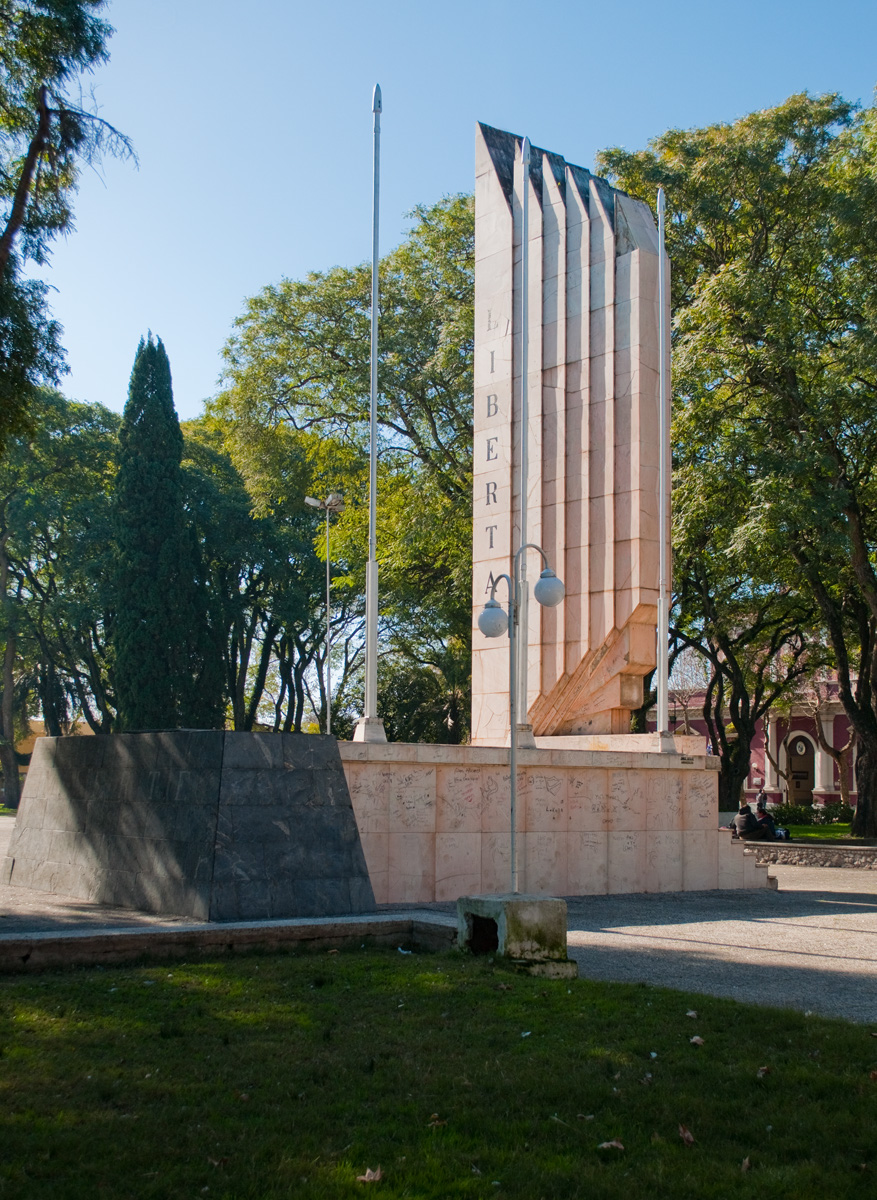 Treinta y Tres Orientales. Ubicada en el departamento de Treinta y Tres